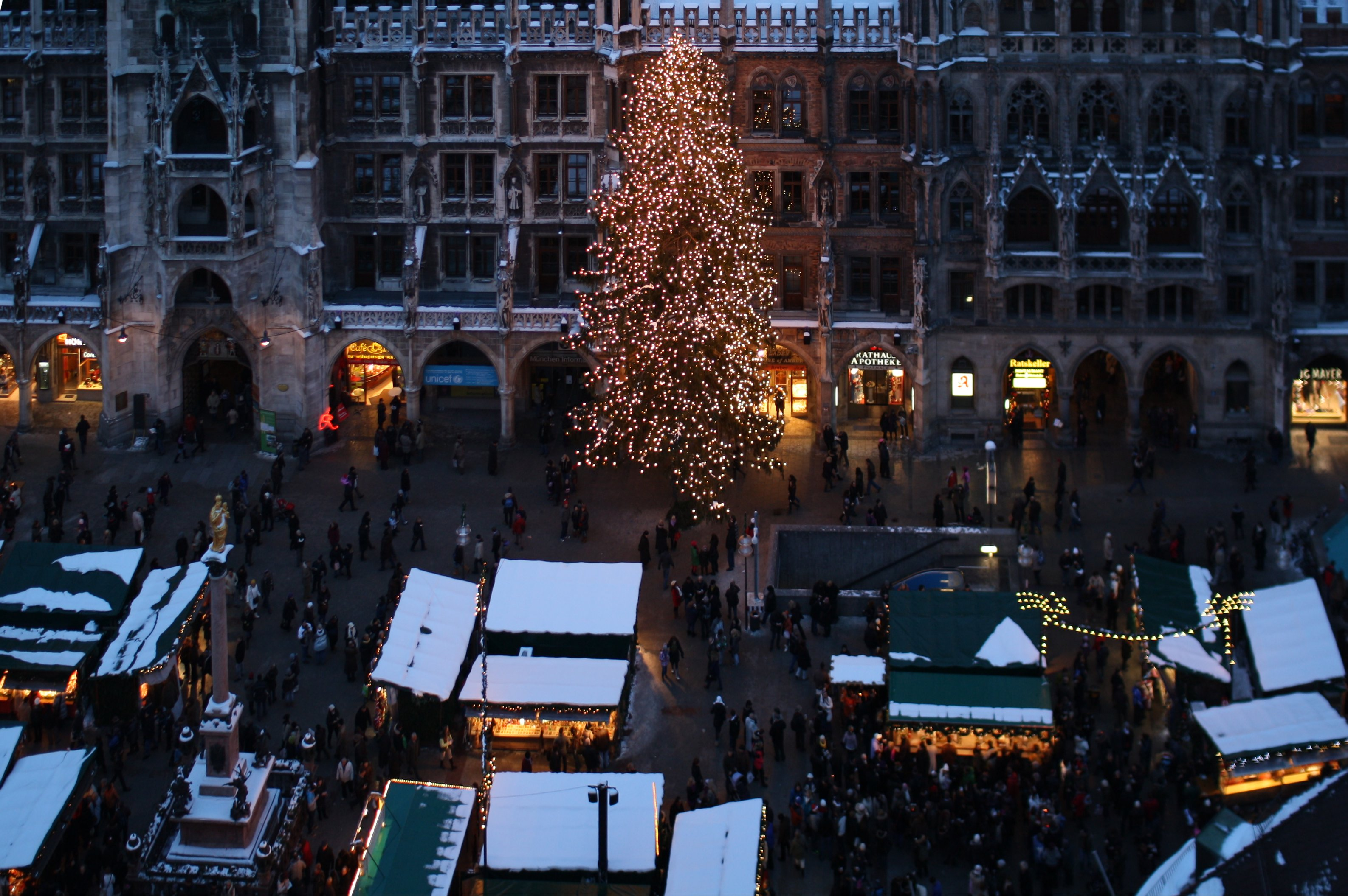 Blick vom Alten Peter auf den Münchner Christkindlmarkt